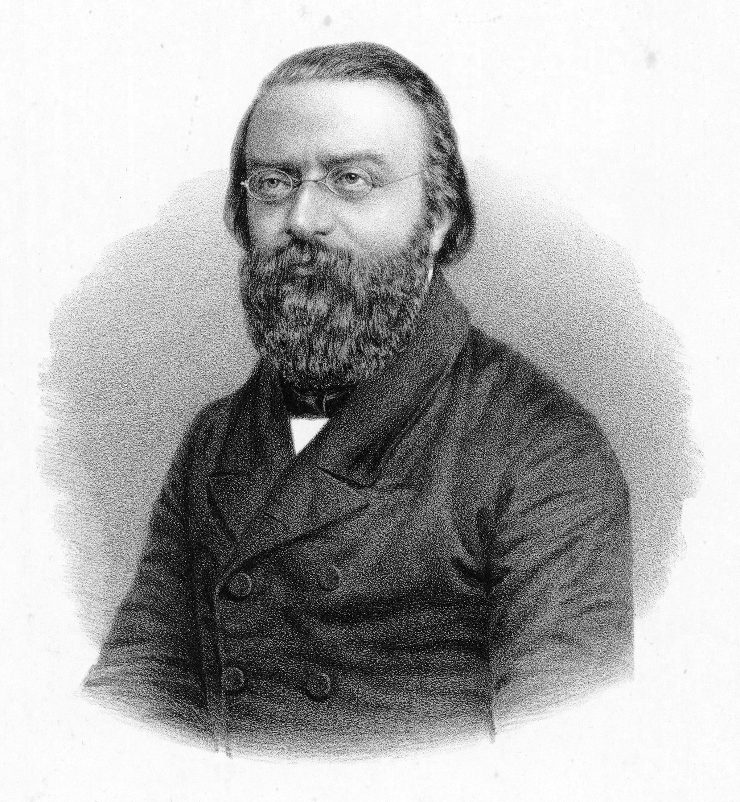 Julius Stern / Lith. v. G. Klein ; nach einer Photographie v. Lutze und Witte